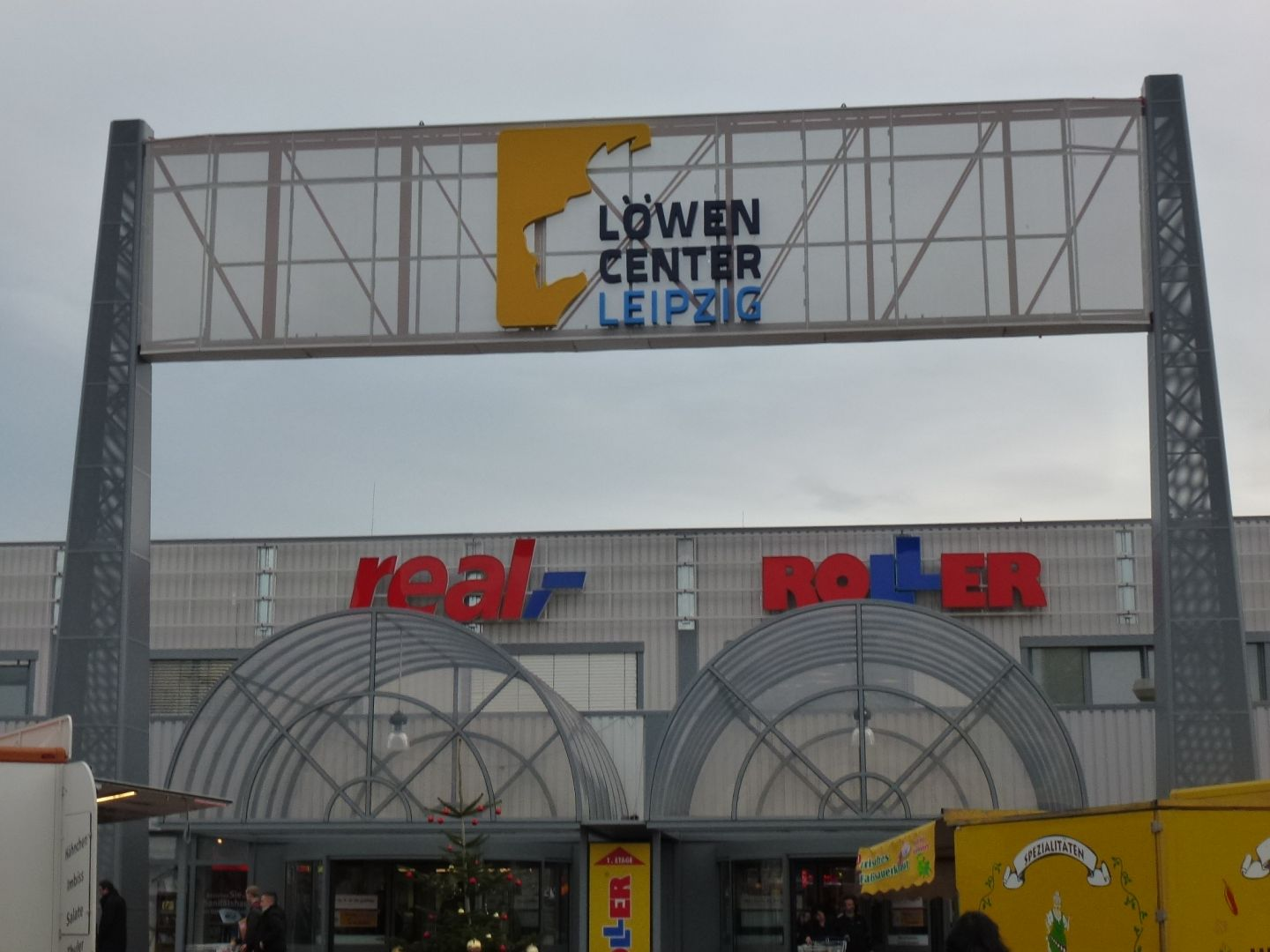 Löwen-Center in Burghausen nach der Übernahme durch Rockspring